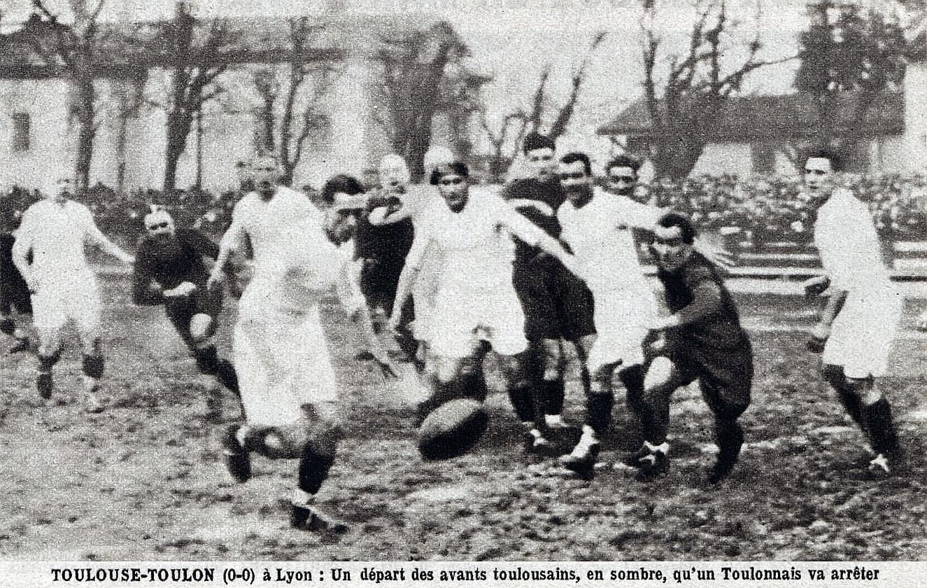 1934 (11 mars) Stade Toulousain (sombre) et RC Toulon (clair) déclarés co-vainqueurs -pour la première et dernière fois- du Challenge Yves du Manoir à Lyon, la finale n'ayant pu être rejouée à une autre date (score 0-0)